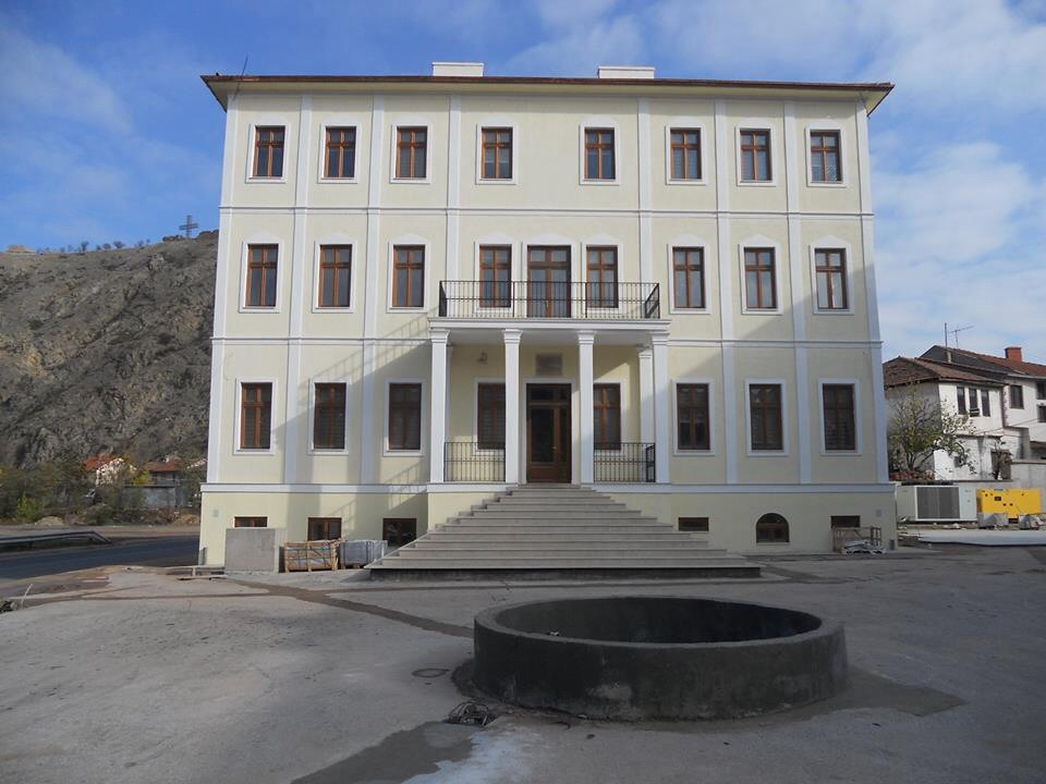 Во Ново Село, во дворот на црквата св. Богородица се наоѓа училиштето во кое две години (1894 - 1896) работел Гоце Делчев.